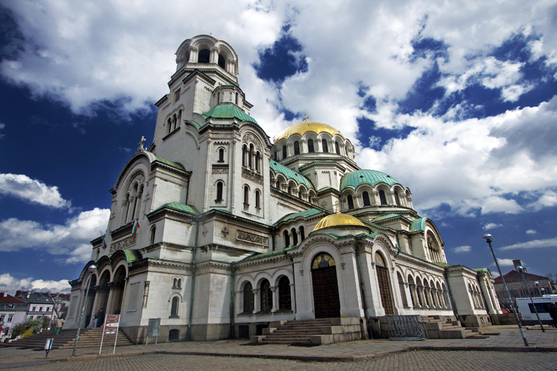 Sofia,Bulgaria